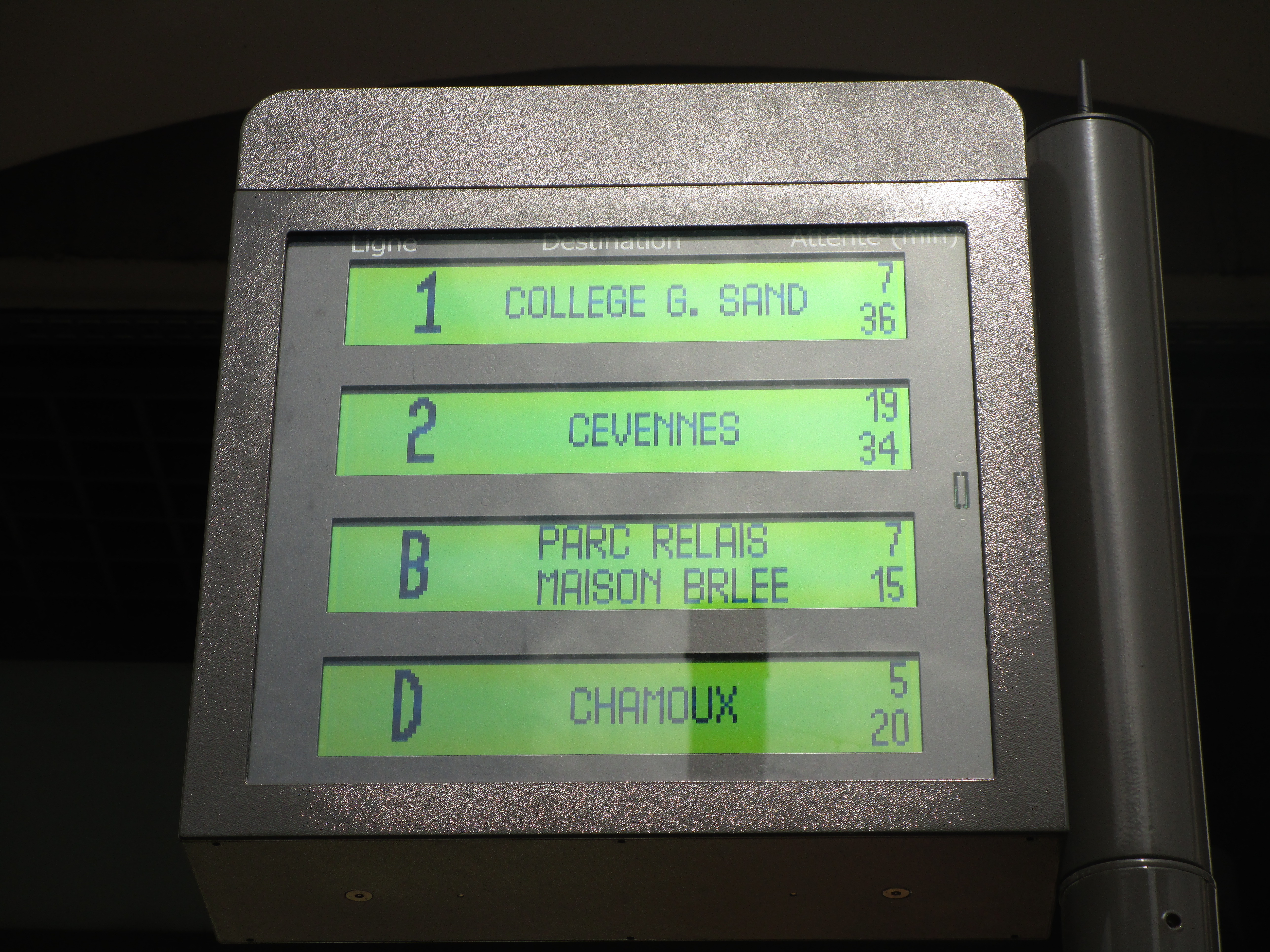 La borne d’information de l’arrêt de bus Ducs à Chambéry le 23 mars 2017.